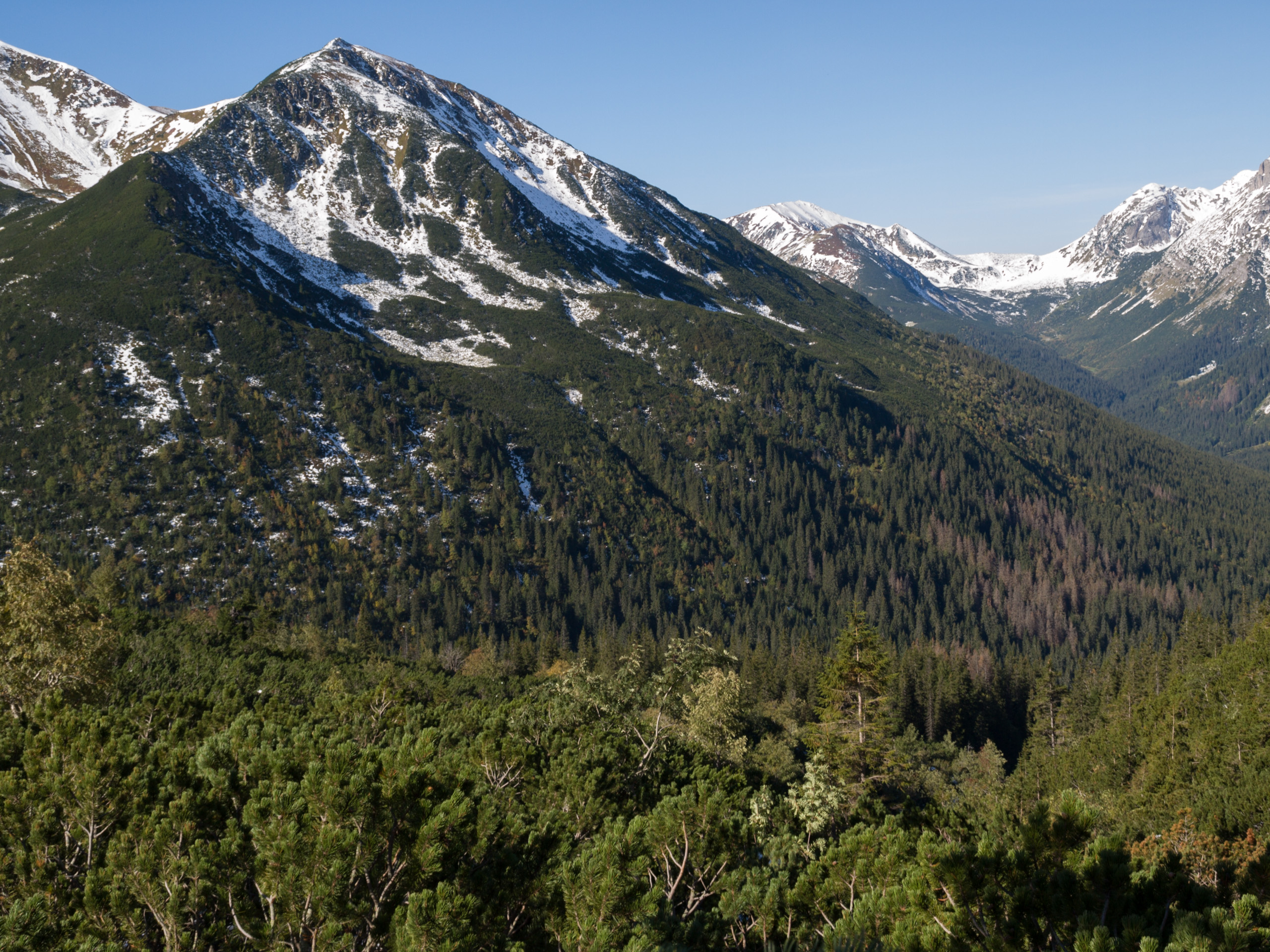 Rycerowa Kopa